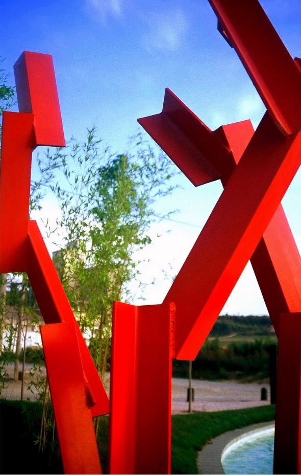 Parc de l'Aigua -Escultura "Arbre Vermmel" de Daniel Navas + Neus Solé